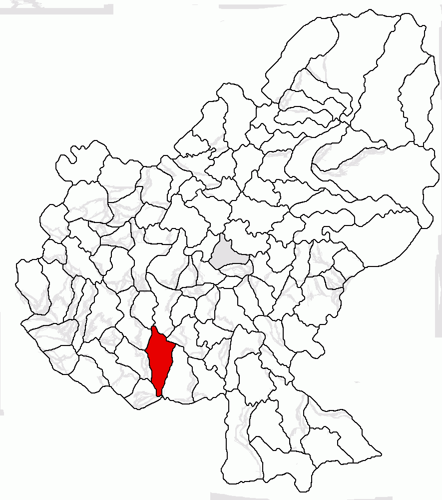 Categorie:Hărţi ale judeţului Mureş